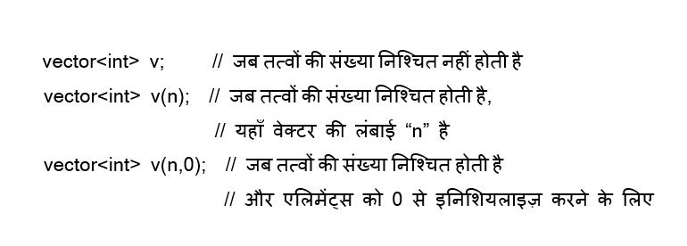 वेक्टर डिक्लेरेशन